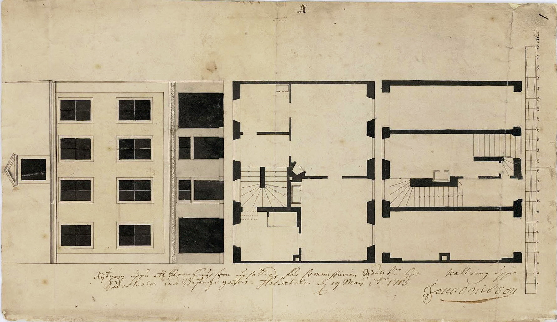 Stockholms stads äldsta bevarade bygglovritning (ingår i världsminne) är ett privathus på Basugatan. Ritningen är daterad 19 maj 1713 och signerad Jonas Nilson.